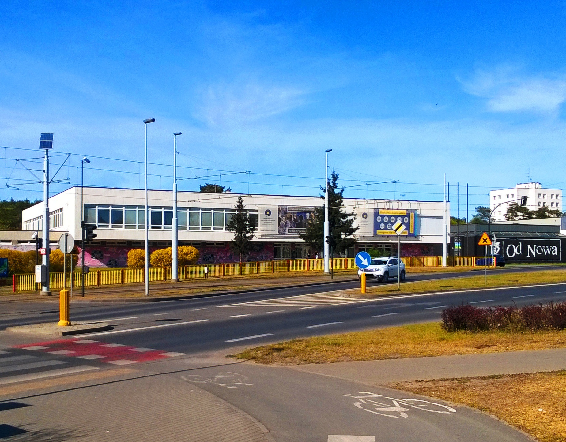 Wydział Teologczny UMK Toruń